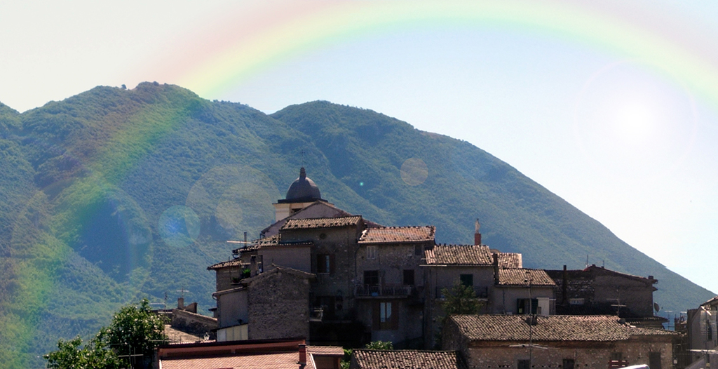 Autore/Fotografo: Dark Simon